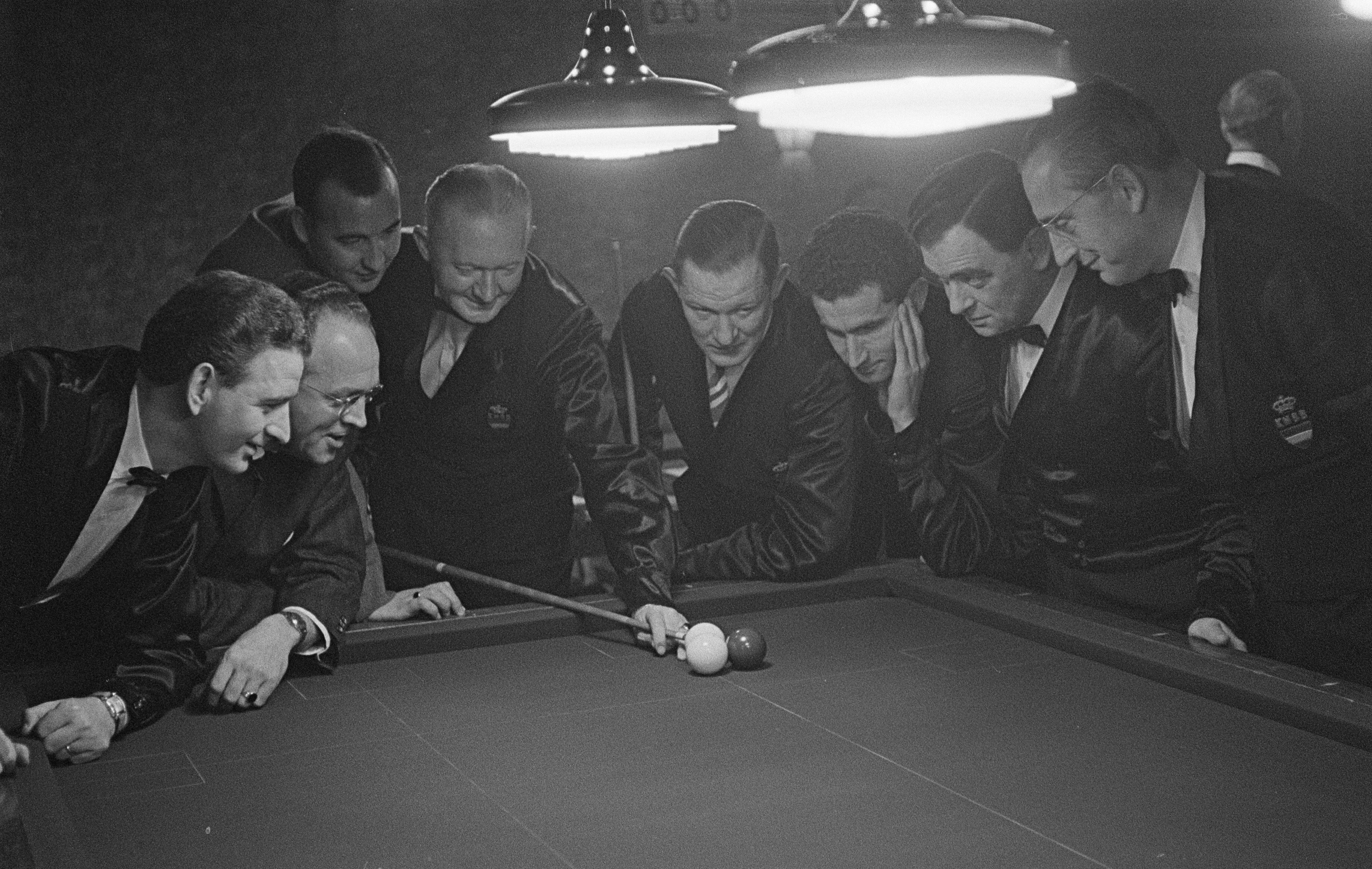 Collectie / Archief : Fotocollectie Anefo Reportage / Serie : [ onbekend ] Beschrijving : Biljarten Nederlandse kampioenschappen ereklasse 47/2 te Nijmegen, v.l.n.r. Beekman, Ligthart, Van Loon , Van de Poll , Metz, Van Nijnatten , De Ruyter en [tekst afgebroken] Datum : 17 december 1959 Locatie : Nijmegen Trefwoorden : biljarten, sport Fotograaf : Pot, Harry / Anefo Auteursrechthebbende : Nationaal Archief Materiaalsoort : Negatief (zwart/wit) Nummer archiefinventaris : bekijk toegang 2.24.01.05 Bestanddeelnummer : 910-8859